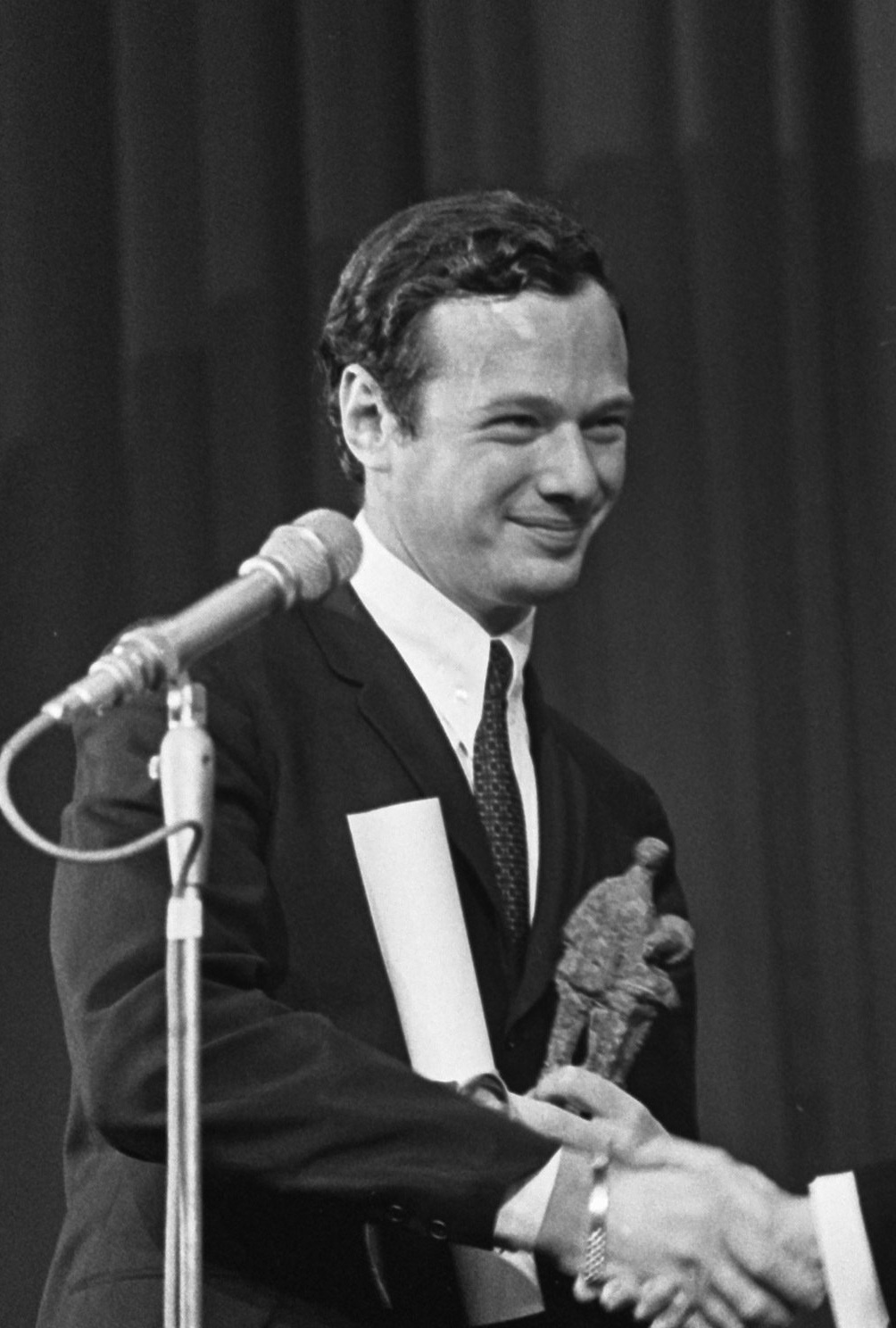 Grand Gala du Disque 1965. Brian Epstein ontvangt "Edison" voor Beatles